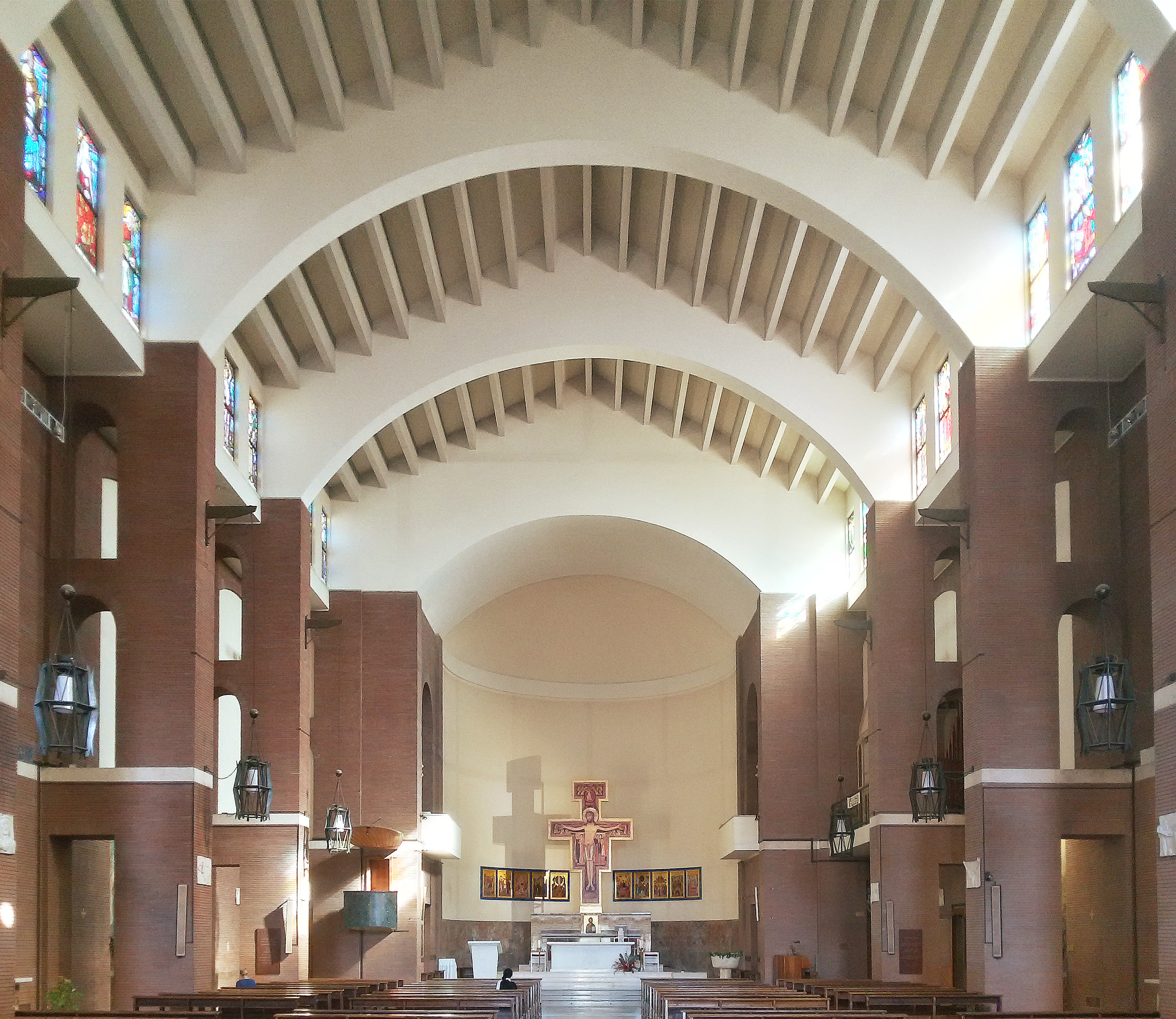 L'interno.